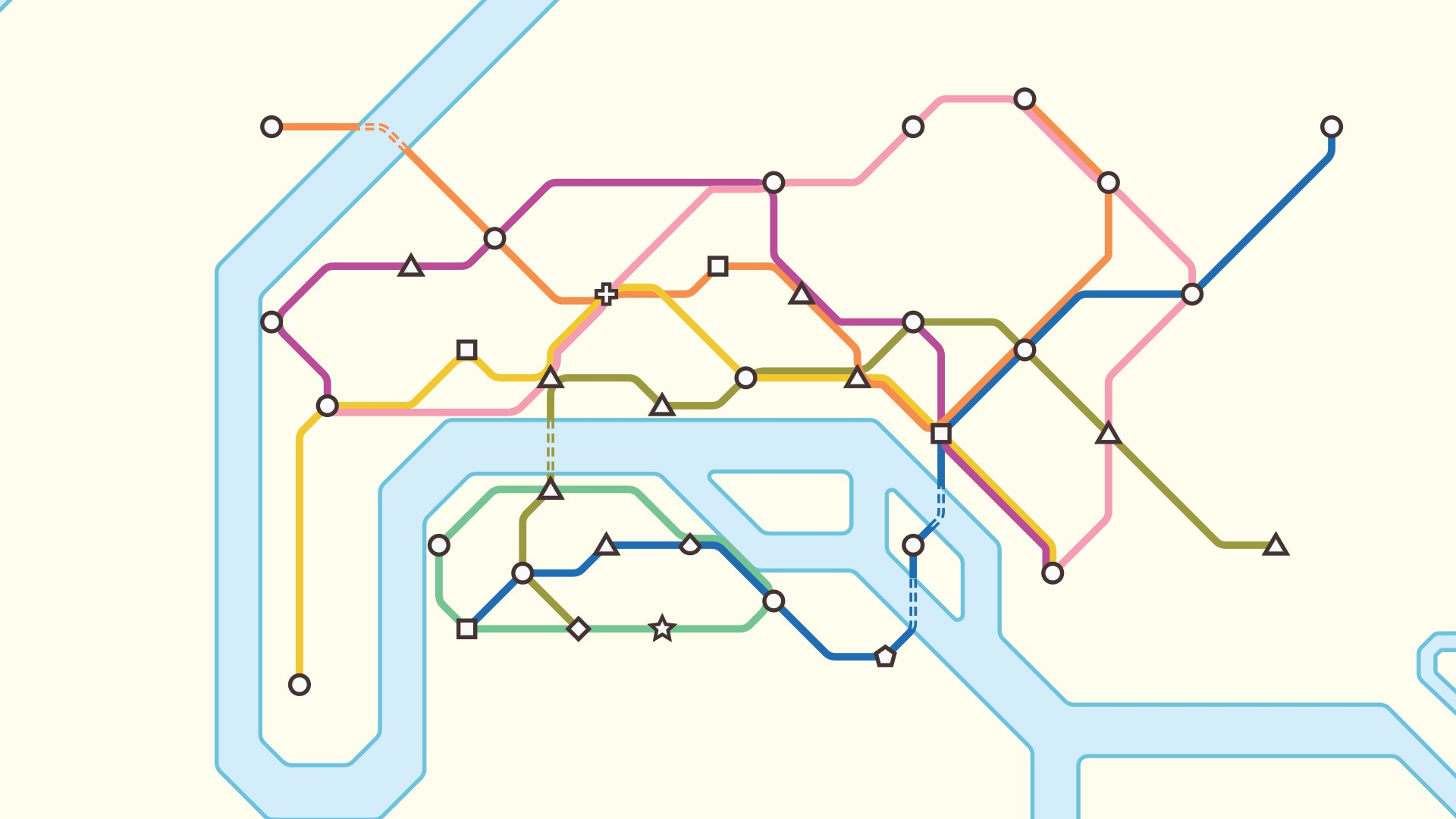 Mini métro - Paris